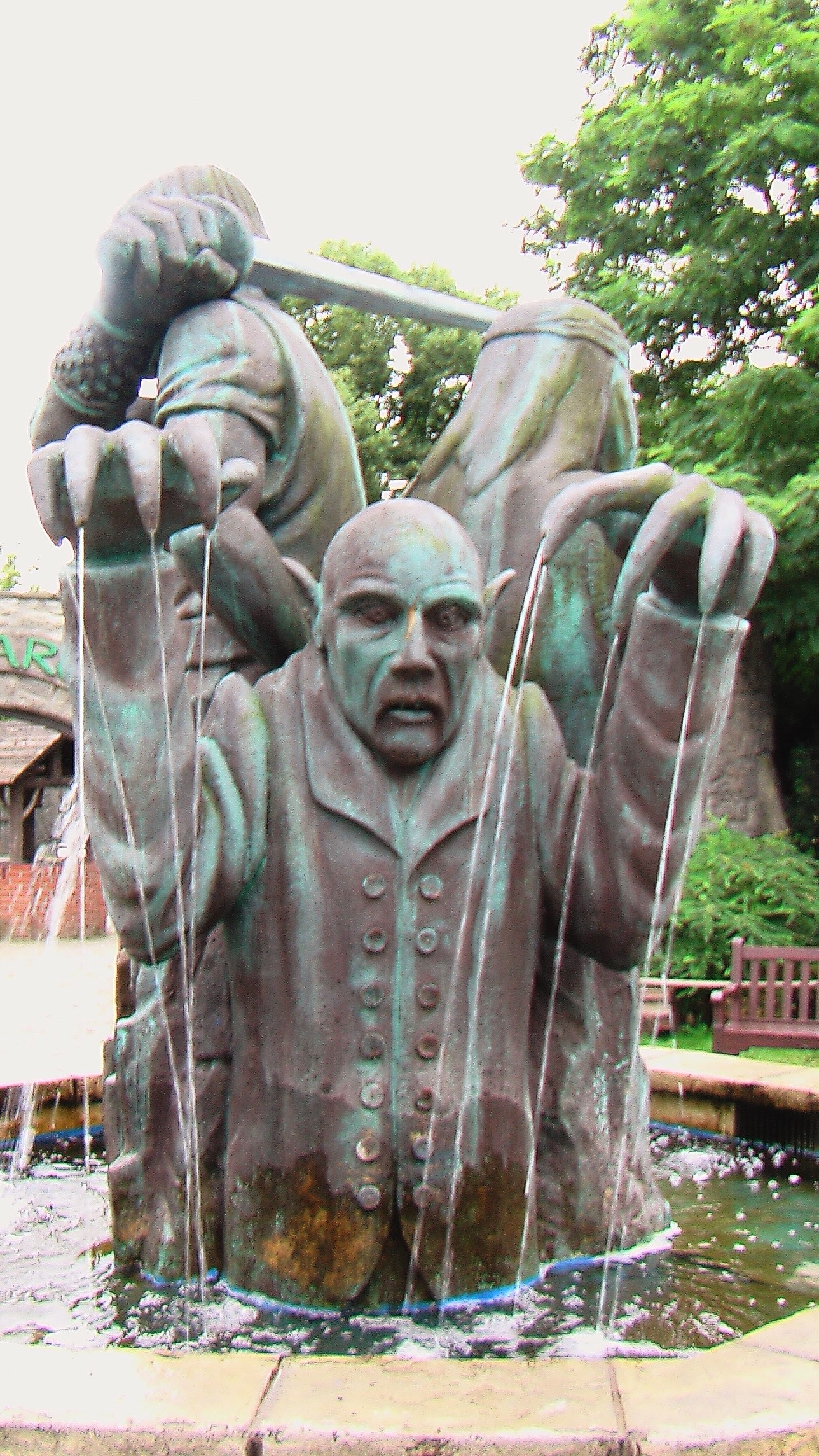 Figur im Filmpark Babelsberg